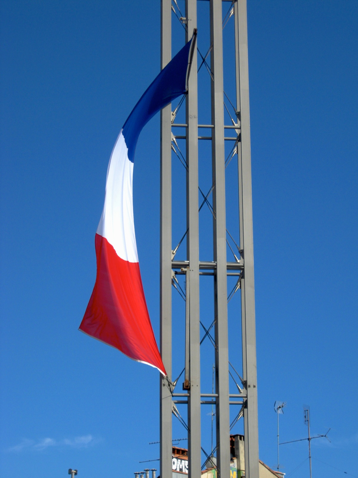 Oriflamme français, place de la Comédie, Montpellier (France), 14 juillet 2008